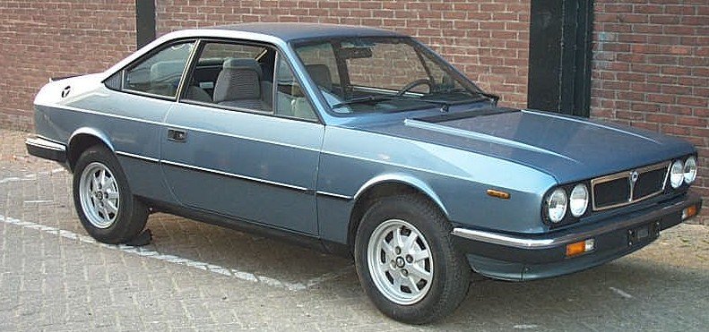 Lancia Beta Coupé 2.0ie 1982